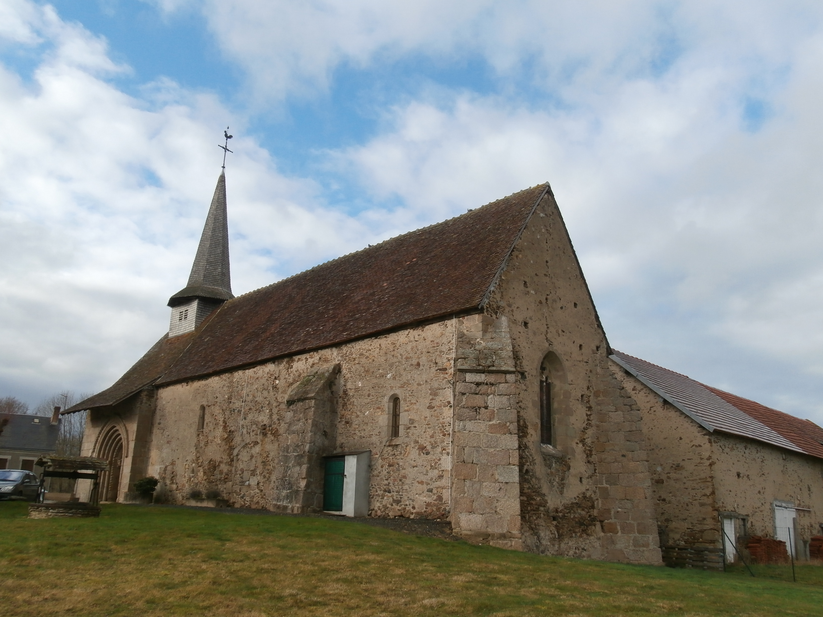 Eglise de la conversion de St-Paul de Villard (France)